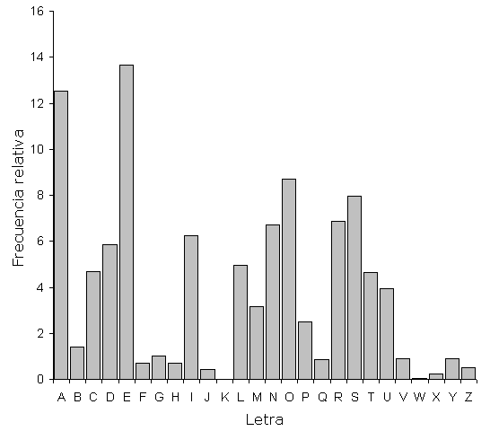 Frecuencia de aparición de letras en español. Creada usando datos de Frecuencia de aparición de letras y de Fletcher Pratt, Secret and Urgent: the Story of Codes and Ciphers Blue Ribbon Books, 1939, pp. 254-255.